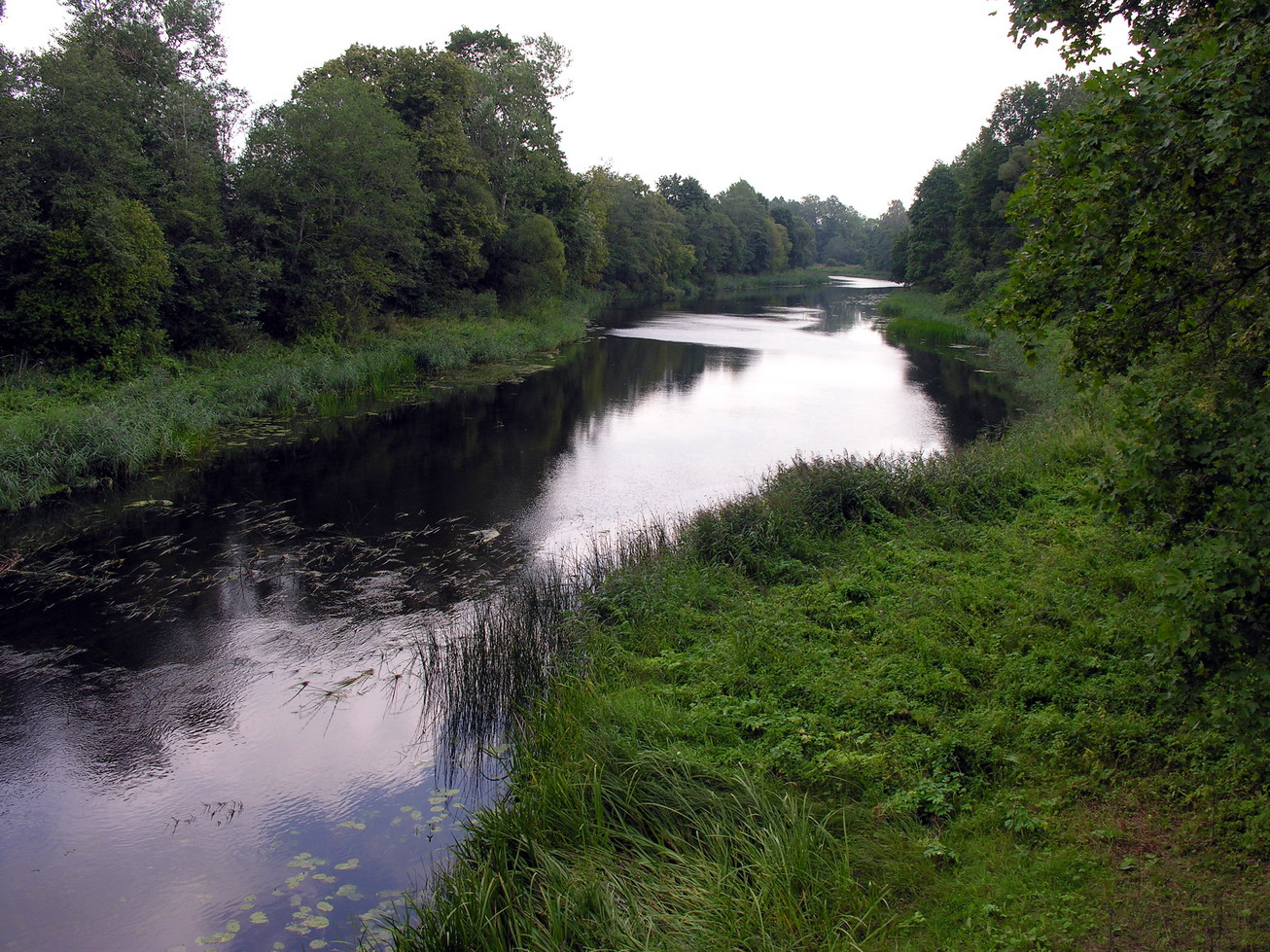 Venta, Mažeikių raj., Viekšnių seniūnija Venta ties Palnosais Foto: Algirdas, 2006 m. rugpjūčio 15 d., Lietuva